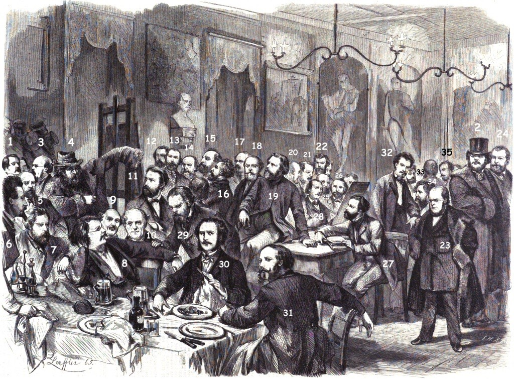 Sitzung des Vereins Berliner Künstler im Jahr 1865.